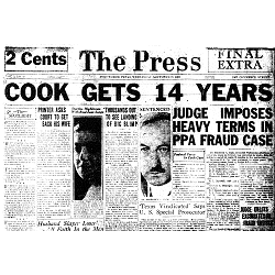 Sulle prime pagine dei giornali a caratteri cubitali appariva la notizia della condanna di Cook a 14 anni di carcere